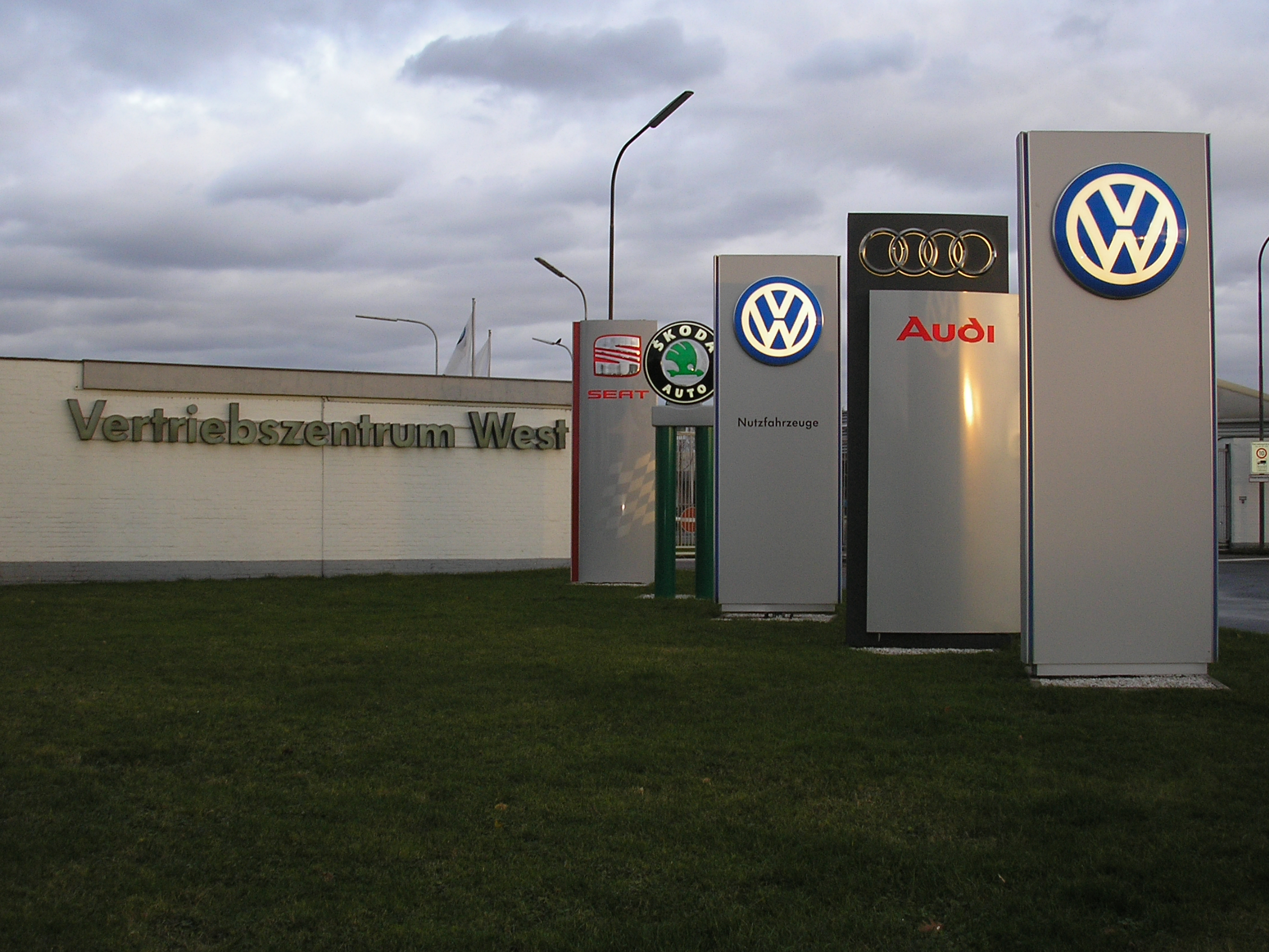 Vertriebszentrum West für SEAT, Skoda, Audi und VW in Köln-Poll.